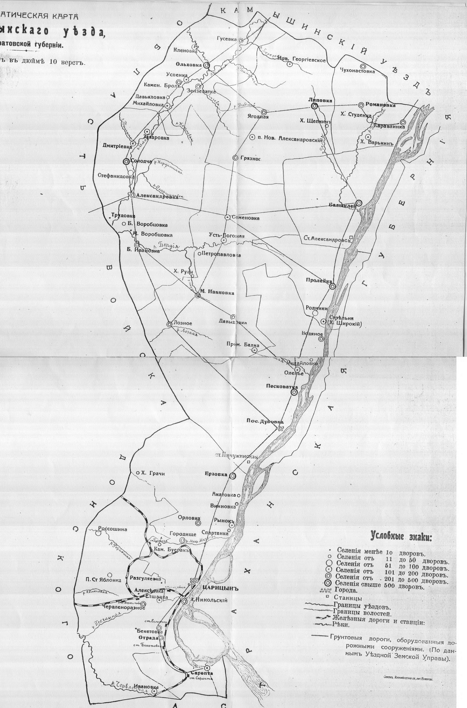 Карта Царицынского уезда начала 20 века